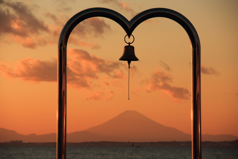 石の町金谷（恋人の聖地）